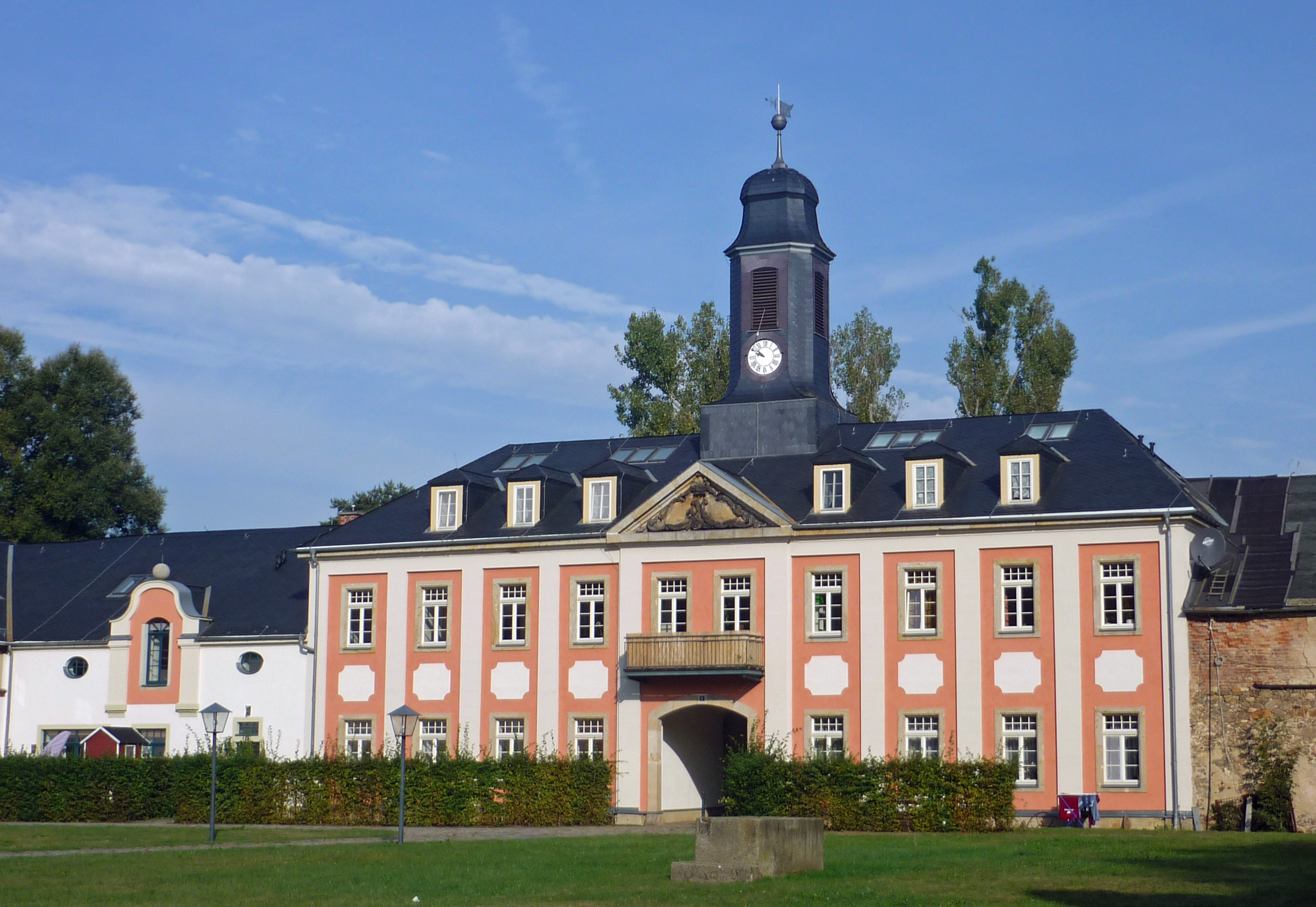 Torhaus des ehem. Ritterguts in Großharthau